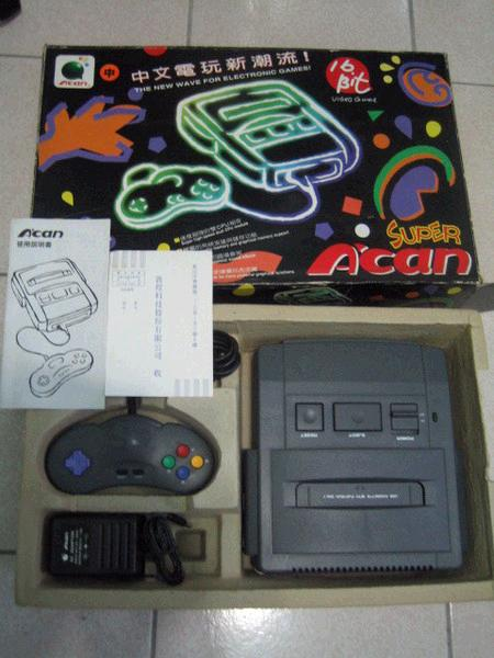 國產主機 A'can 照片。